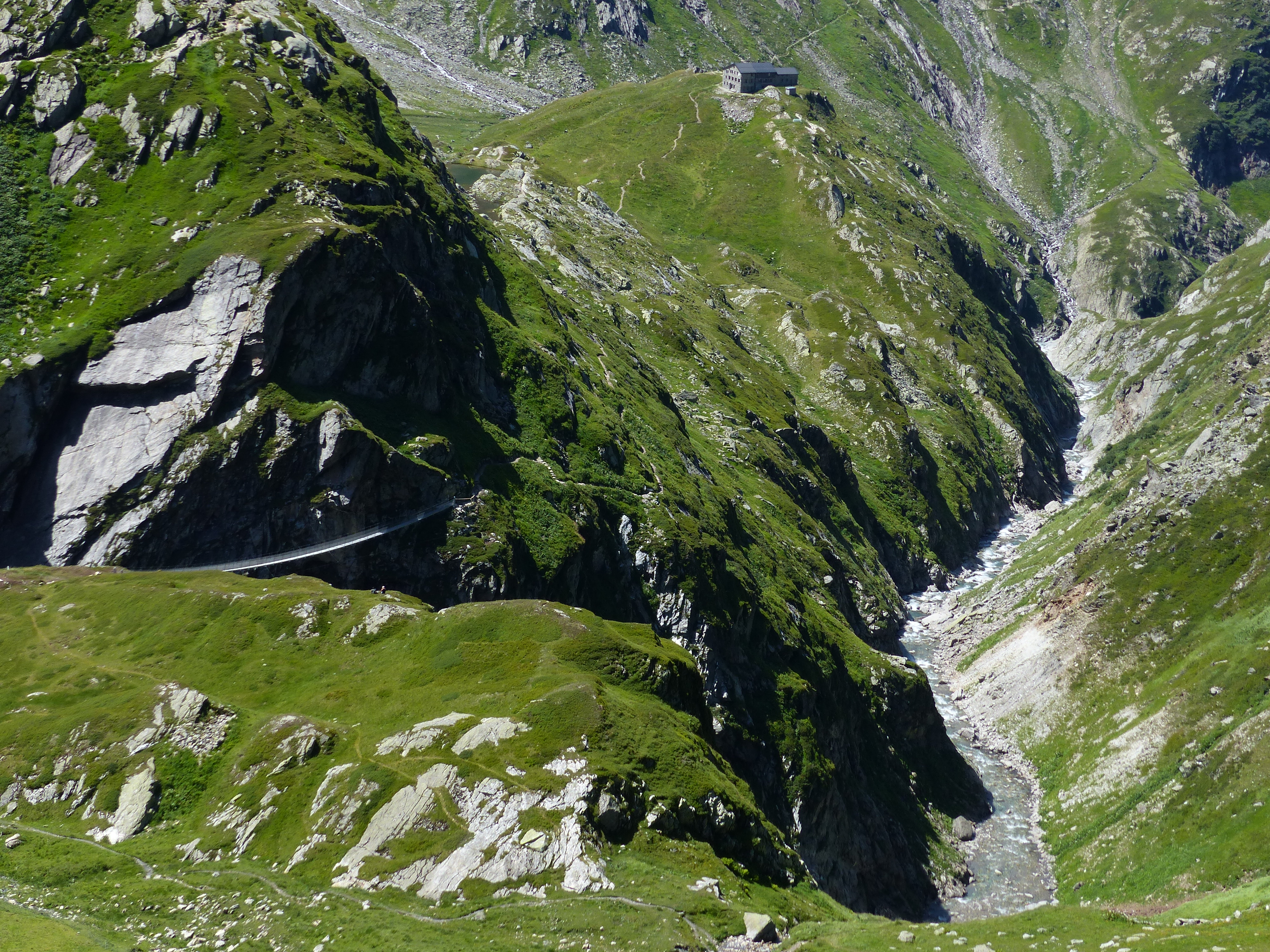 Die 2018 erbaute Punt la Greina mit Terri-Hütte